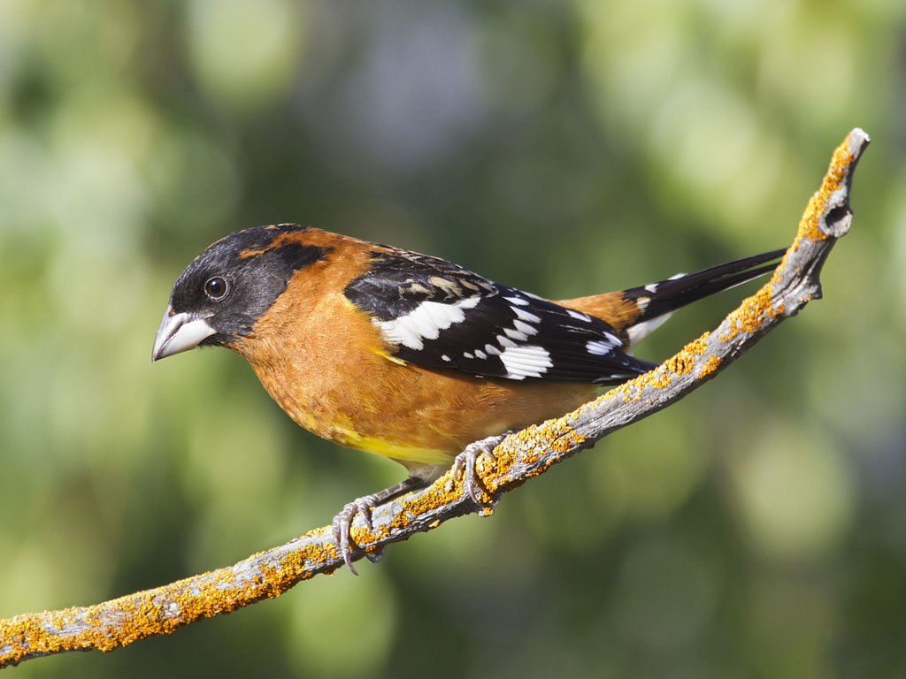 Arroyo Grande, San Luis Obispo Co., CA, USA. May 5